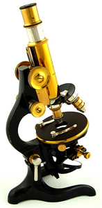 Antique Leitz Microscope of 1909